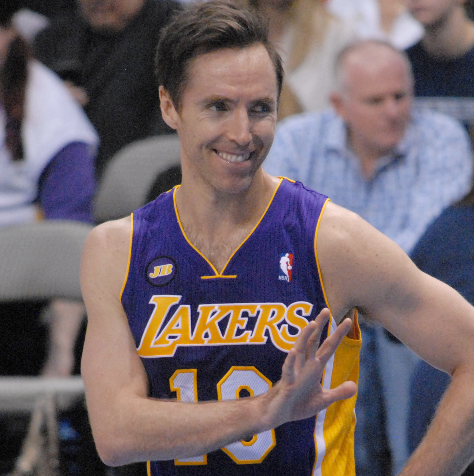 basketball,nba,2/24/2013 steve nash